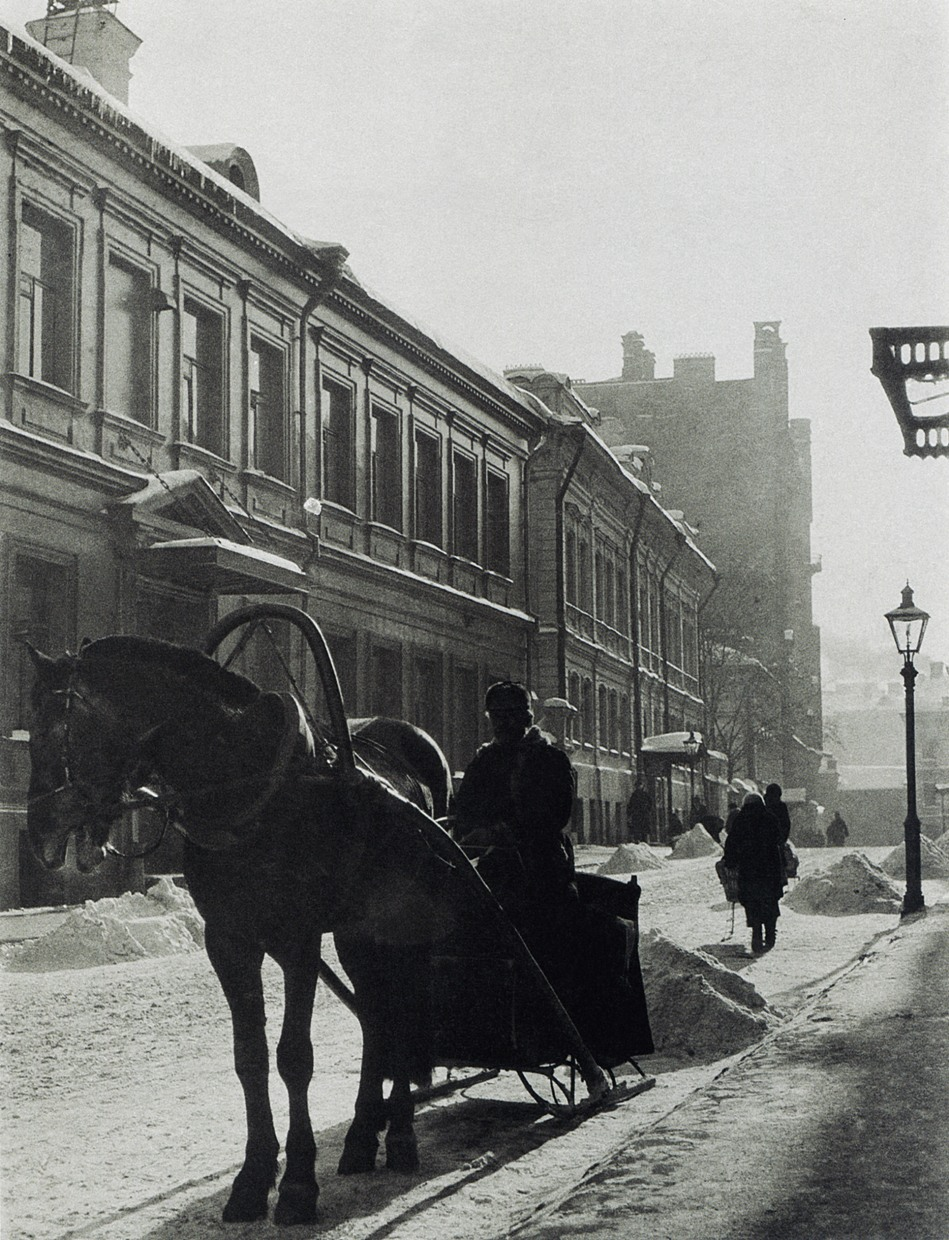 оригинал